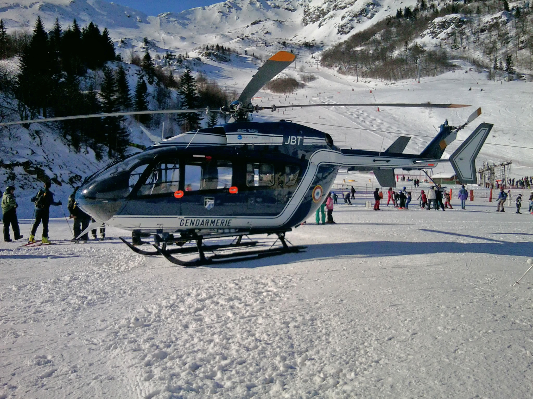 Un Eurocopter EC 145 de la Gendarmerie Nationale aux Monts d'Olmes le 22/02/2012